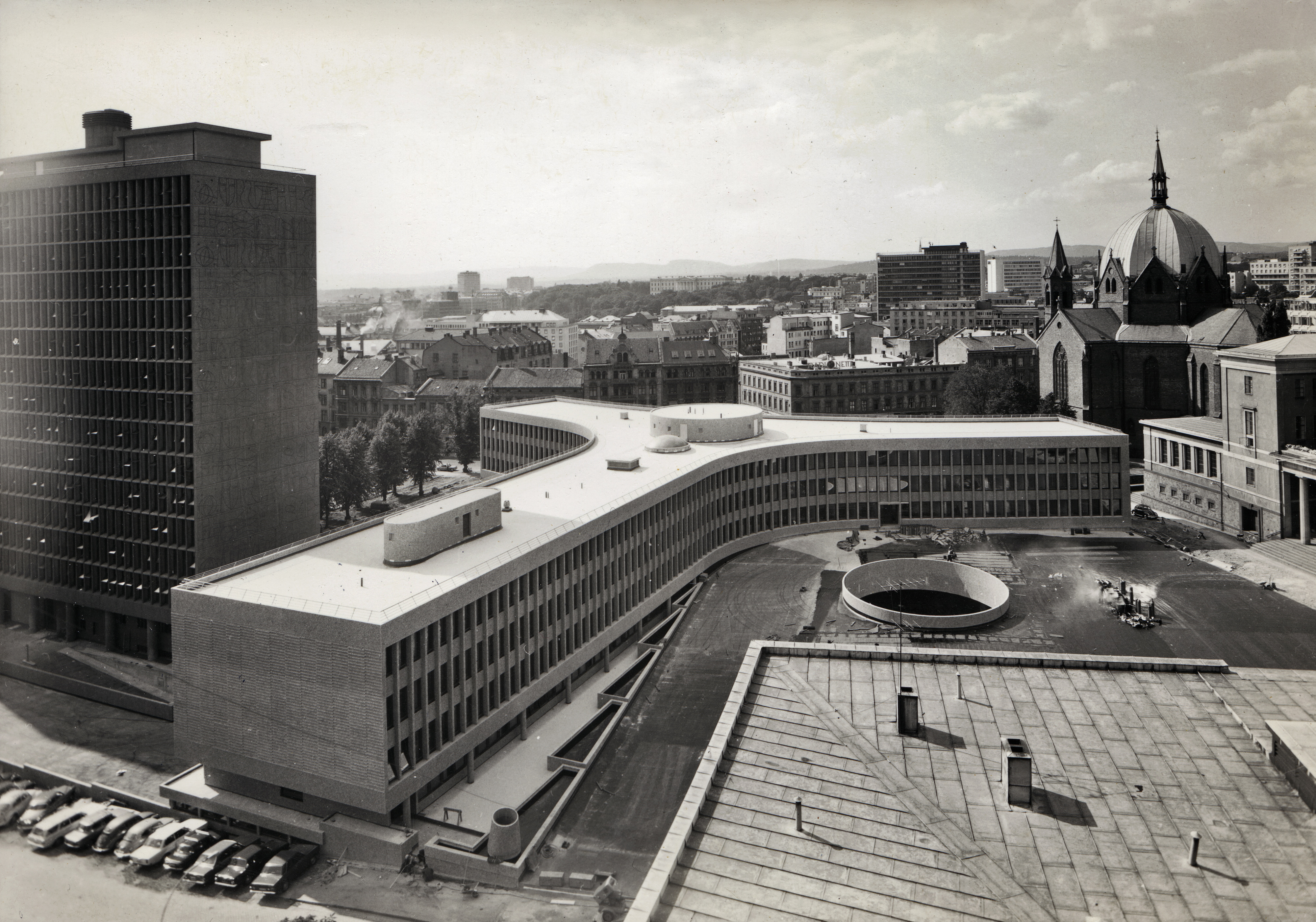 Eksteriørfoto av Y-blokka i Regjeringskvartalet.Arkitekt Viksjø vant arkitektkonkurransen i 1939. Høyblokka i kvartalet sto ferdig i 1958, mens Y-blokka ble føyd til i 1969.